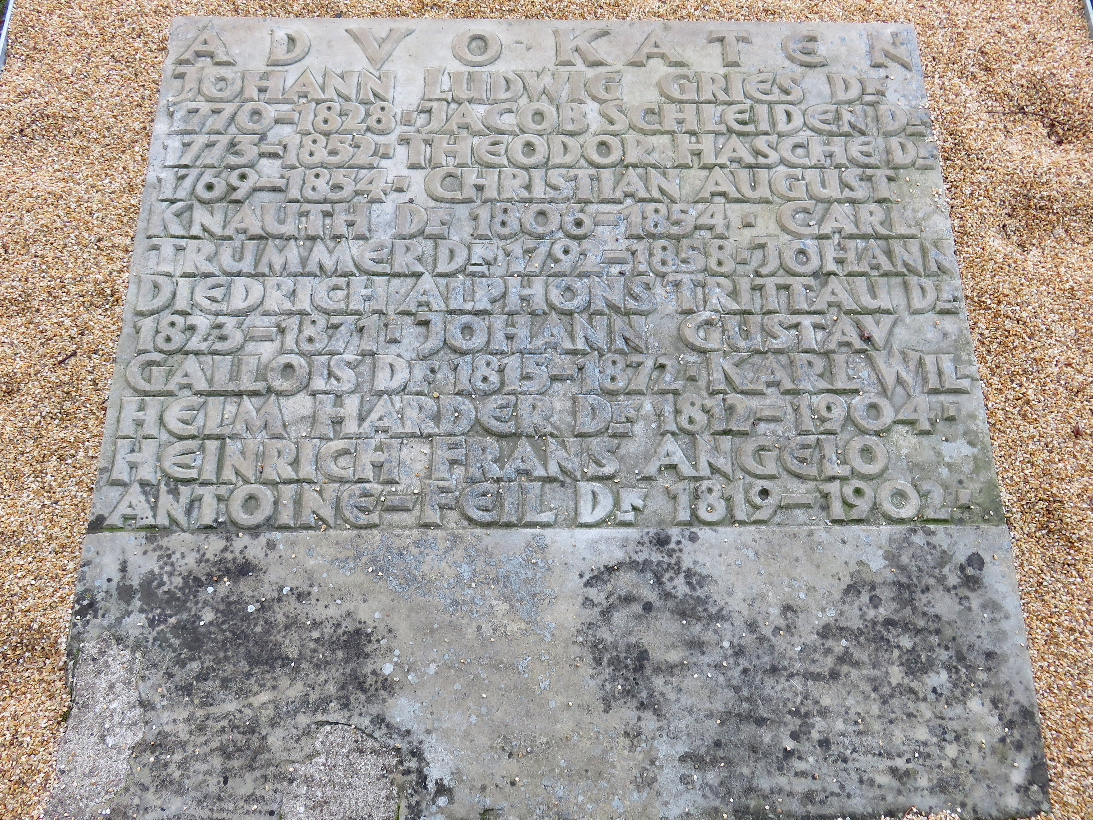 Sammelgrabmal Advokaten im Bereich des Althamburgischen Gedächtnisfriedhofs auf dem Hamburger Friedhof Ohlsdorf zu Ehren von u. a. Johann Ludwig Gries, Carl Trummer, Johann Gustav Gallois, Heinrich Frans Angelo Antoine-Feill.